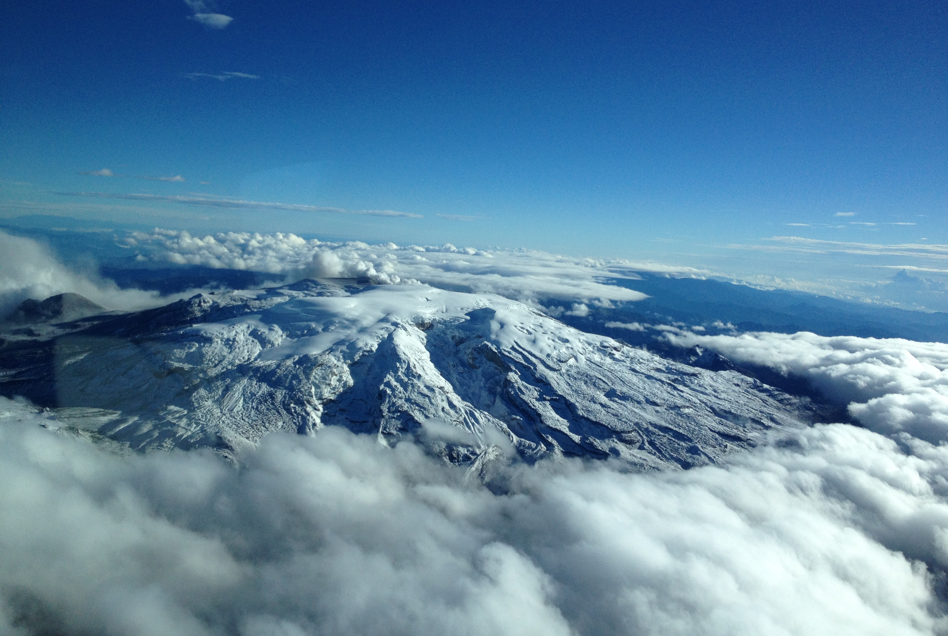 imagen vista de norte a sus, la cual muestra el volcán en estado de reposo